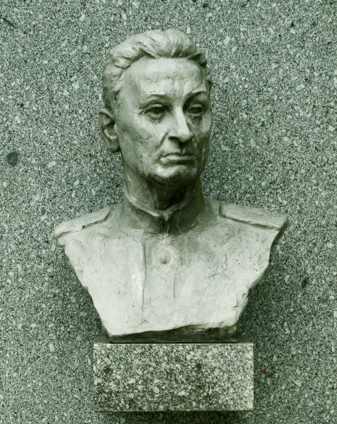 Dukla, Alej Hrdinov - busta maršála Andreja Antonoviča Grečka